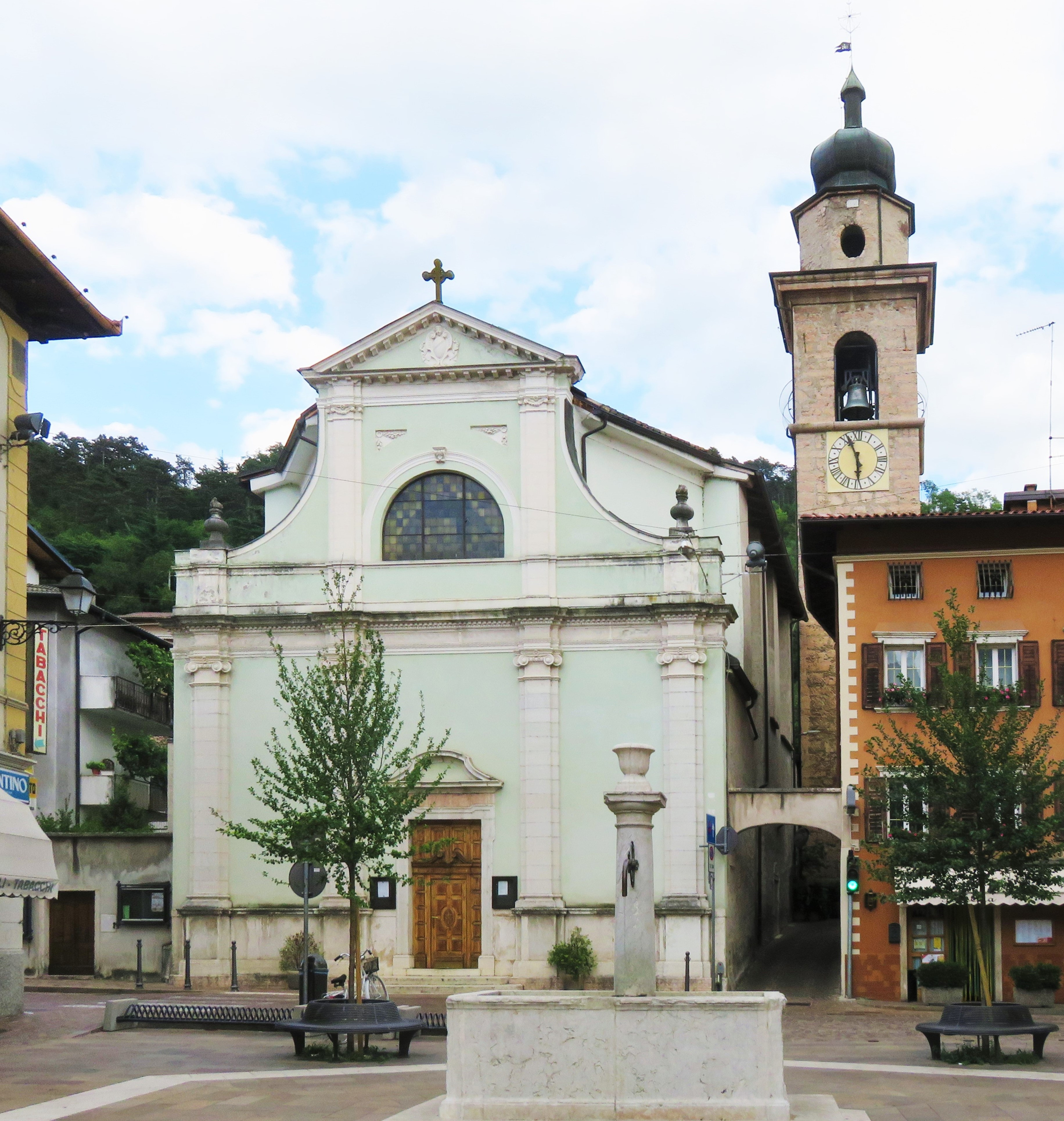 Chiesa di Sant'Antonio a Lizzanella di Rovereto. Facciata.